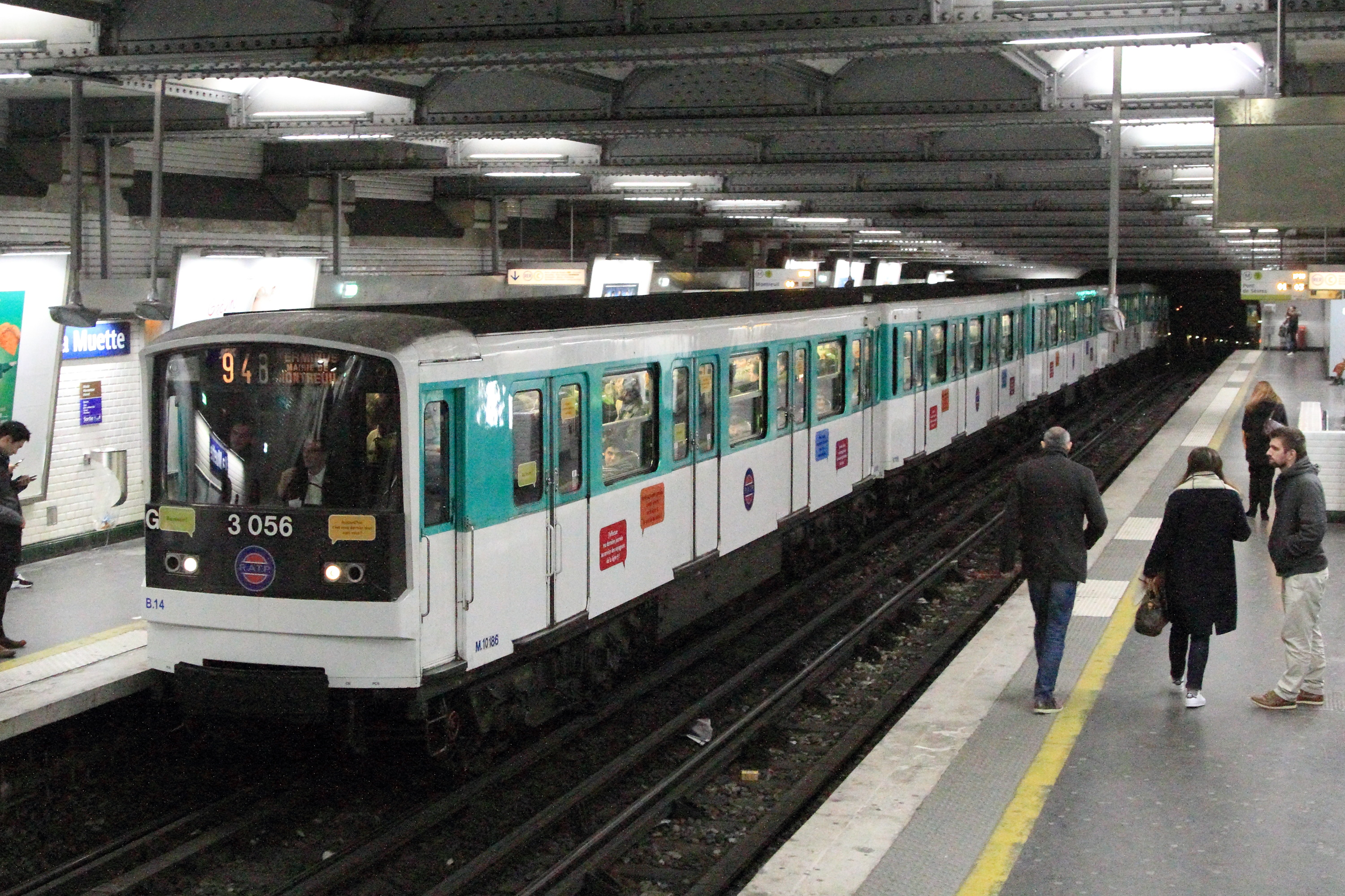 Dernières circulations de la dernière rame de métro de type MF 67 sur la ligne 9, à Porte de Saint-Cloud.